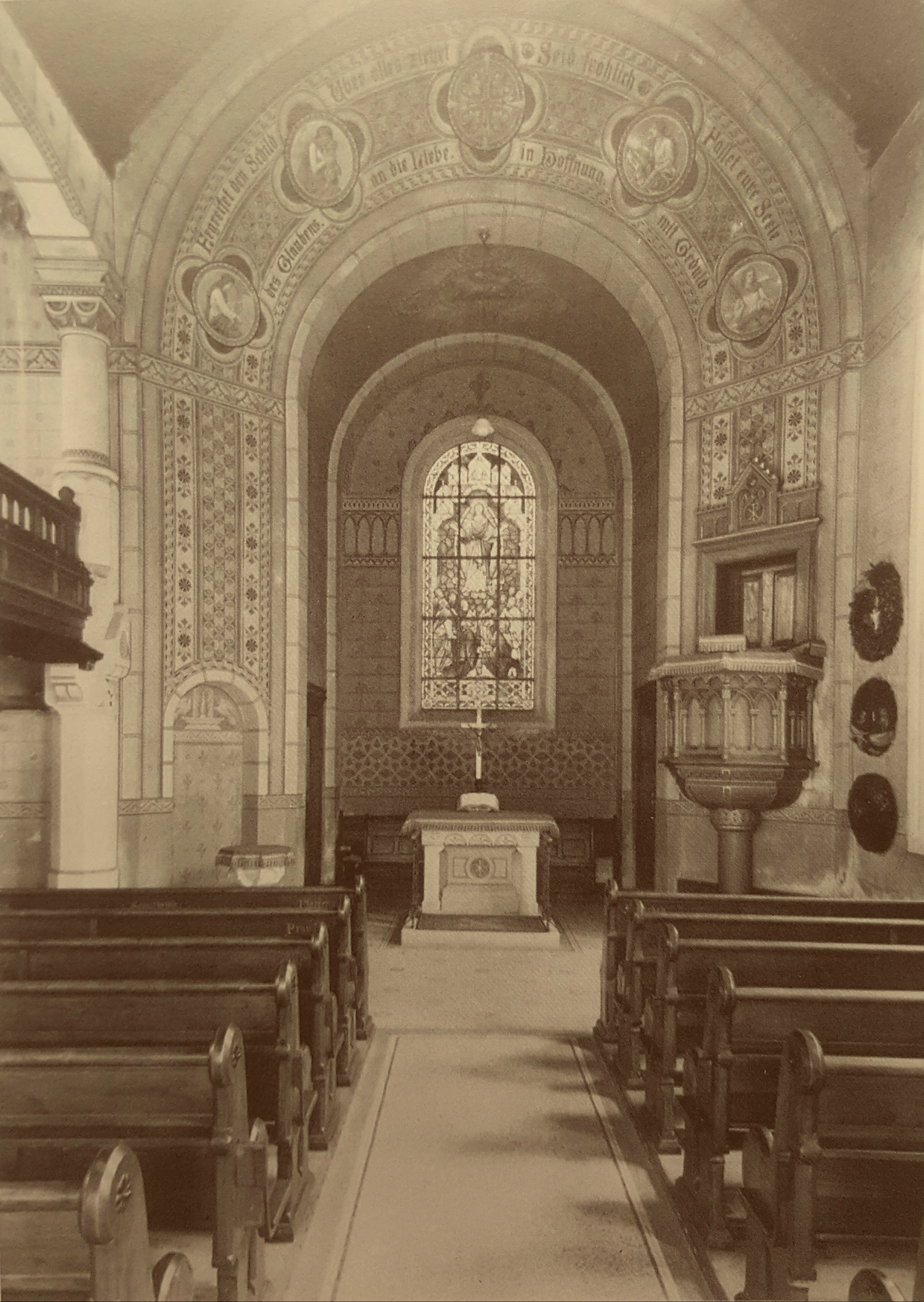 Walddorfhäslach, evangelische Kirche Häslach, Innenraum um 1920